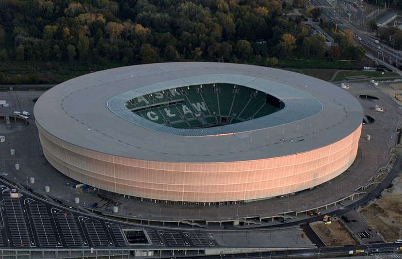 Vista cerrada del estadio